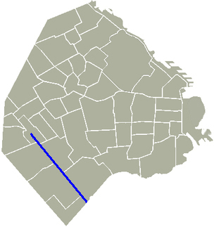 Avenida Escalada, Buenos Aires